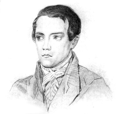 Портет В. Г. Белинского. Акварель А. П. Брюллова с оригинала К. А. Горбунова. 1838.